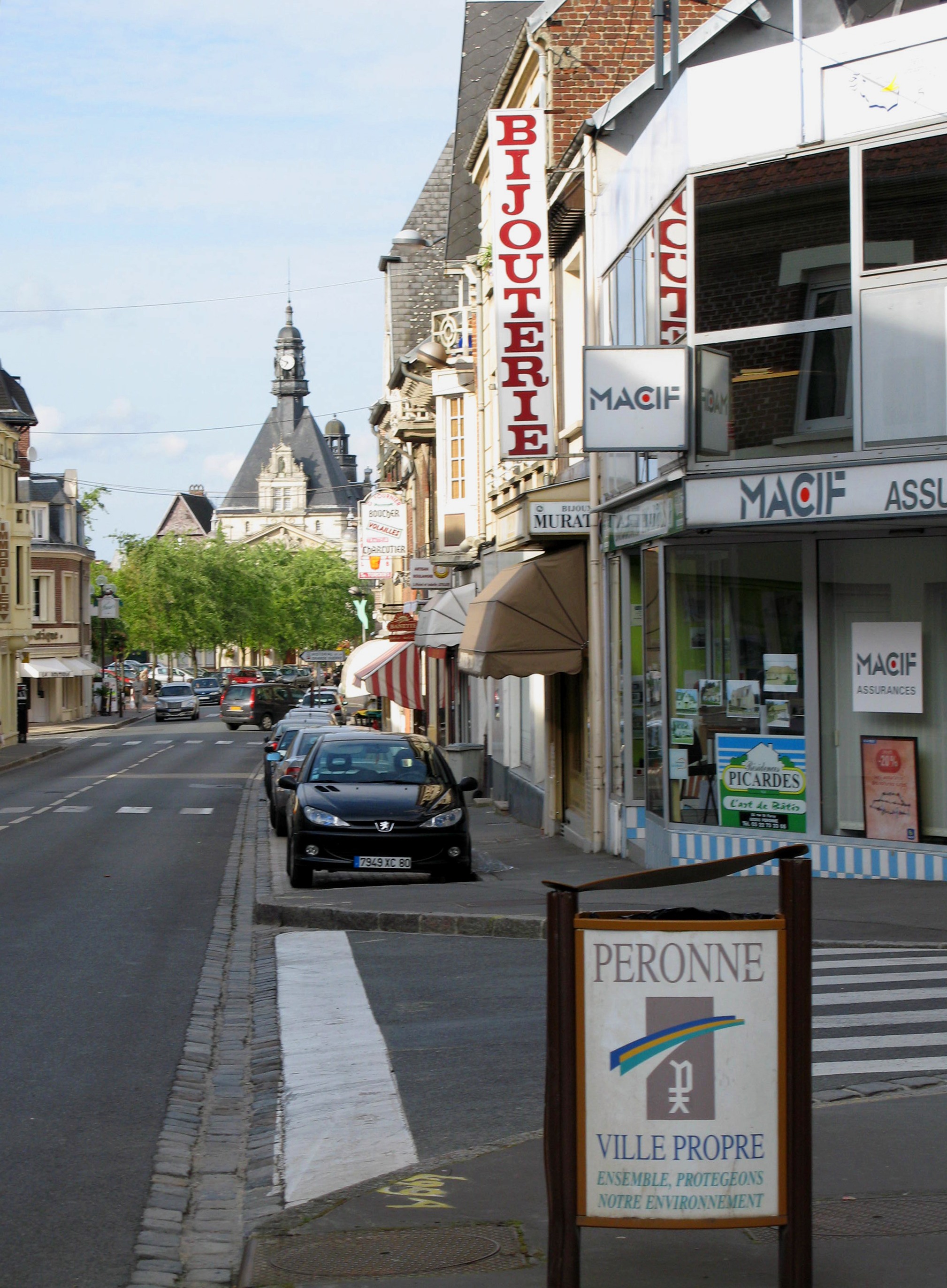 Péronne (Somme, France) - Centre ville avec l'Hôtel-de-Ville au bout de la rue St-Fursy.